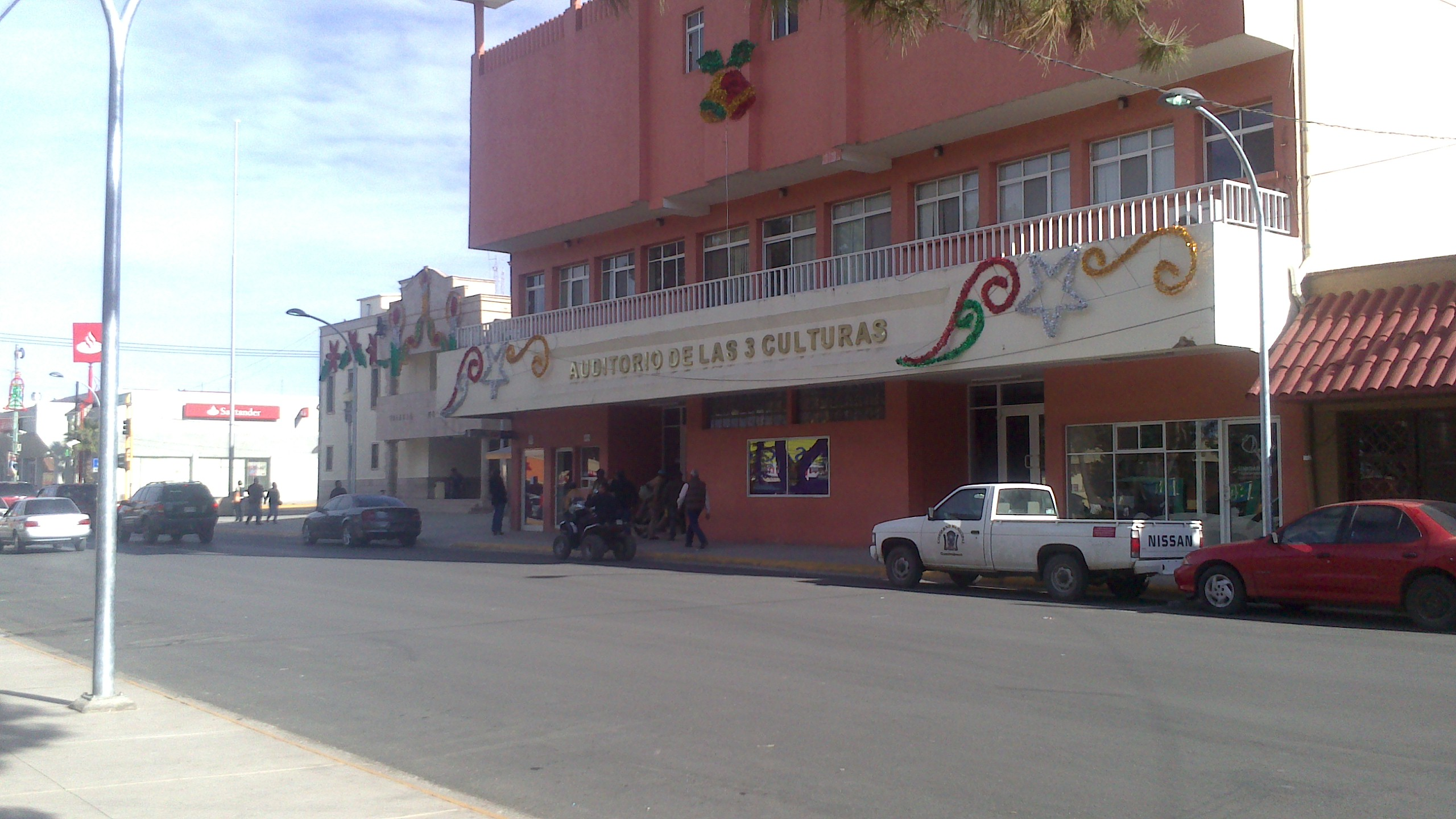 Antes fue conocido como el Cine Plaza, en cuauhtémoc, Chihuahua.